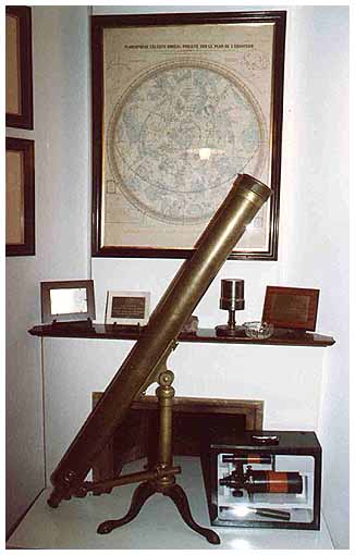 Telescopio Bardou que Camille Flammarion donó a la Sociedad Científica Camille Flammarion de Jaén.